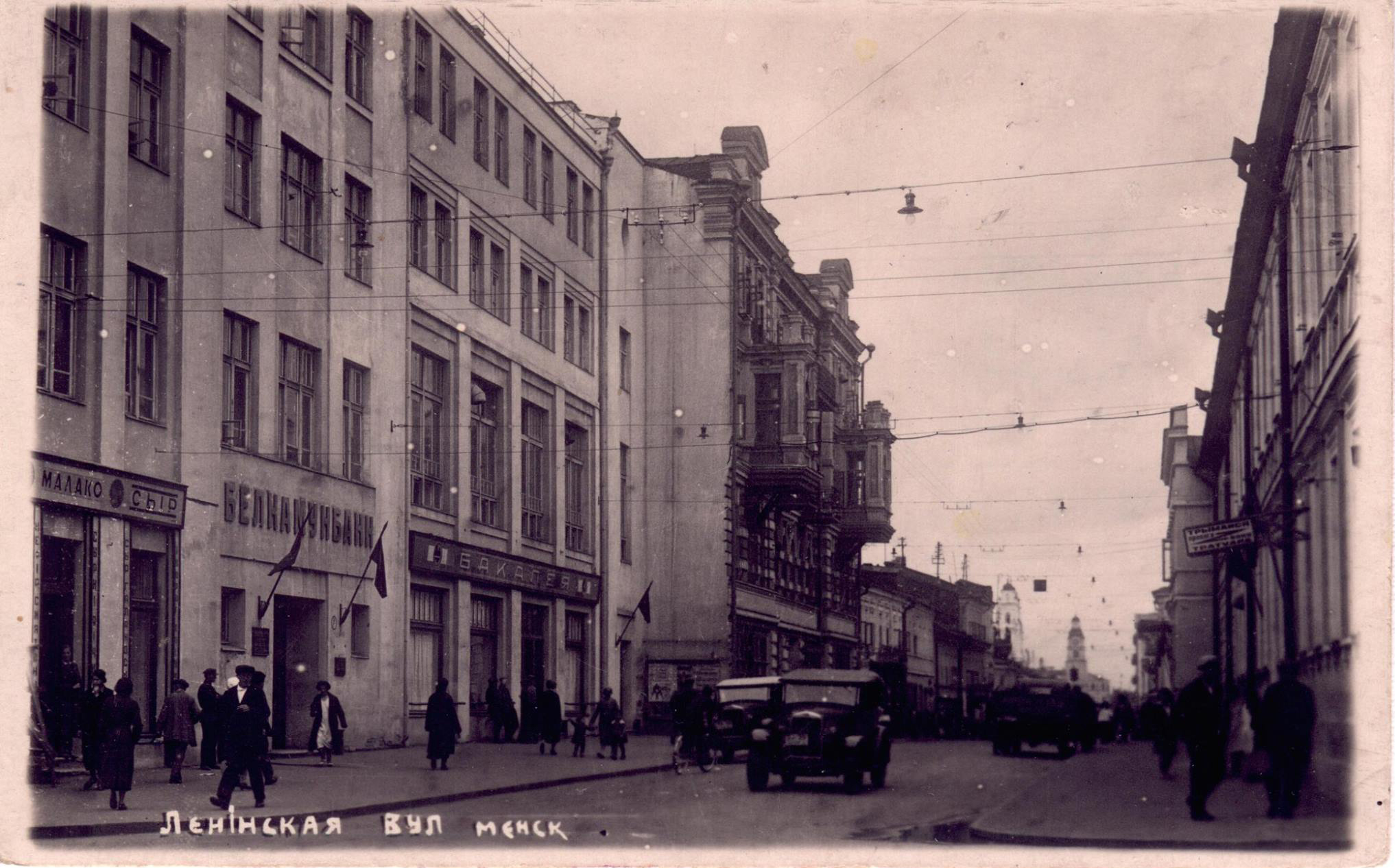 Беларуская (тарашкевіца): Менск (Miensk), вуліца Францішканская (vulica Franciškanskaja) ад скрыжаваньня з Падгорнай (vulica Padhornaja)